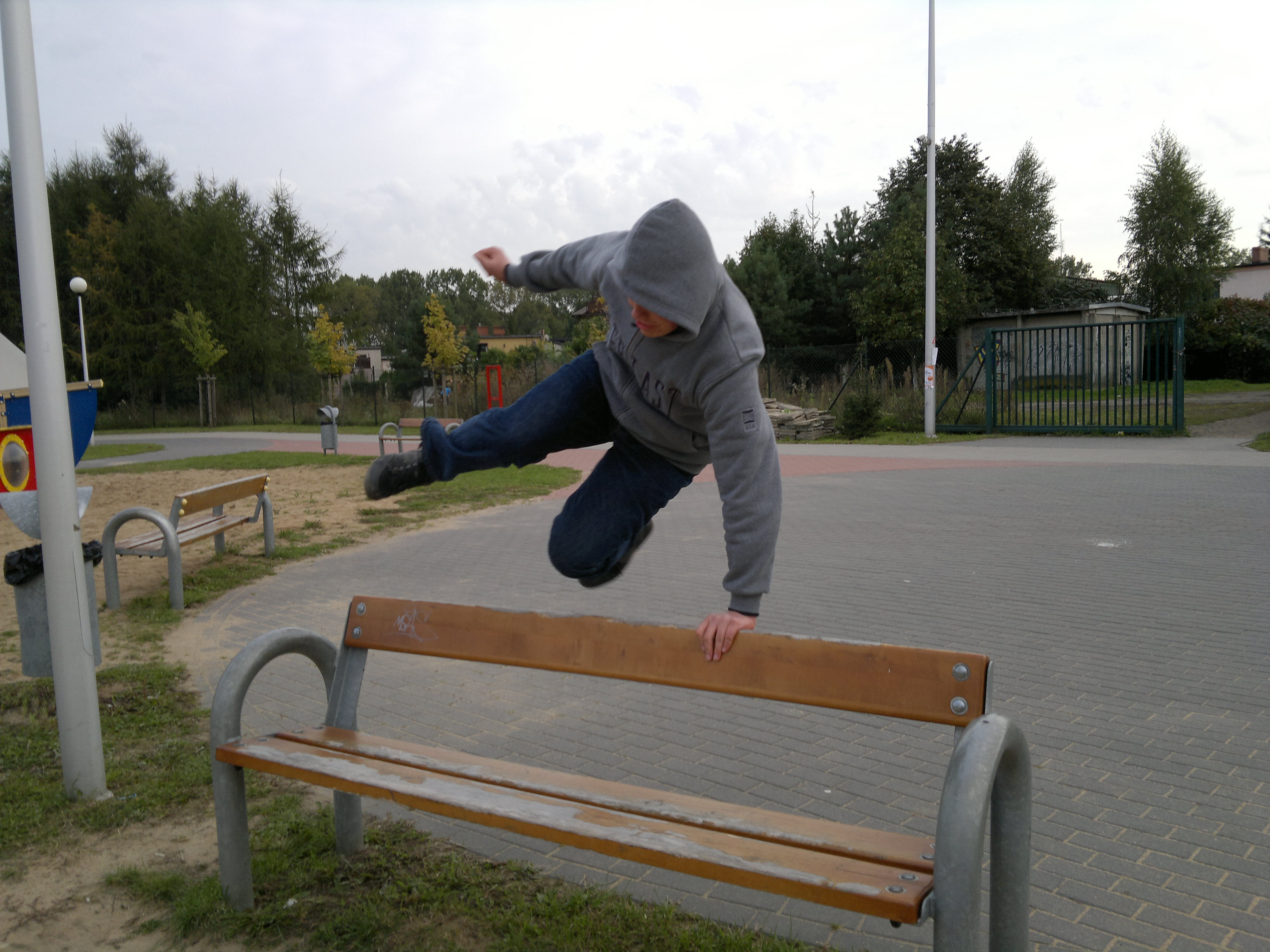 Trauceur pokonywujący przeszkodę